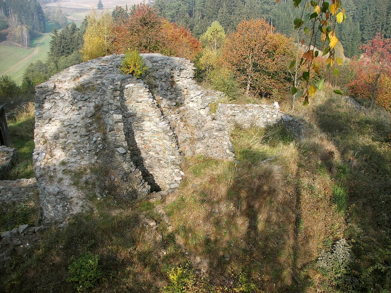 Dominantou Lísku je válcová věž.